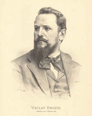 Portréty českých osobností od Jana Vilímka